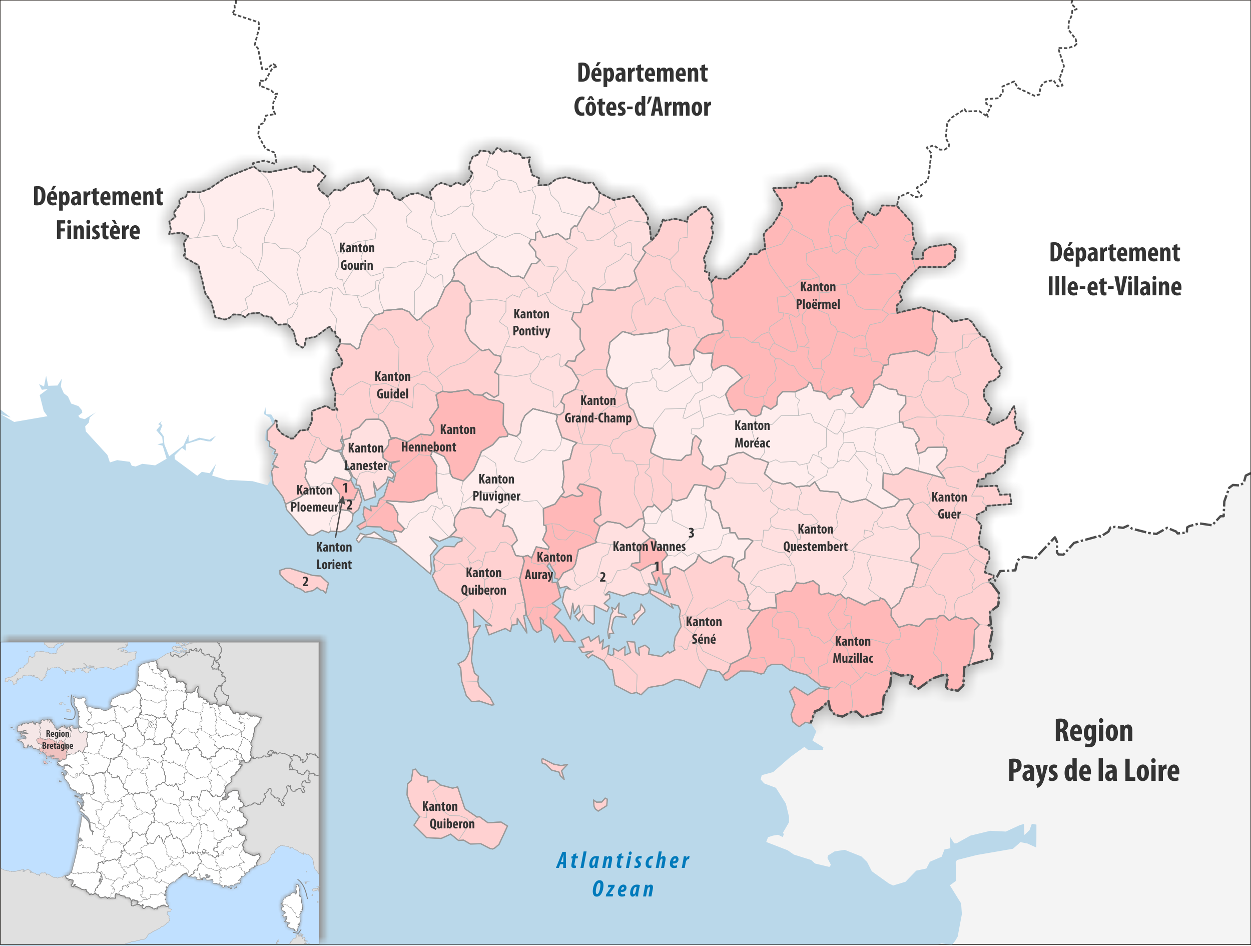 Gemeinden und Kantone im Departement Morbihan